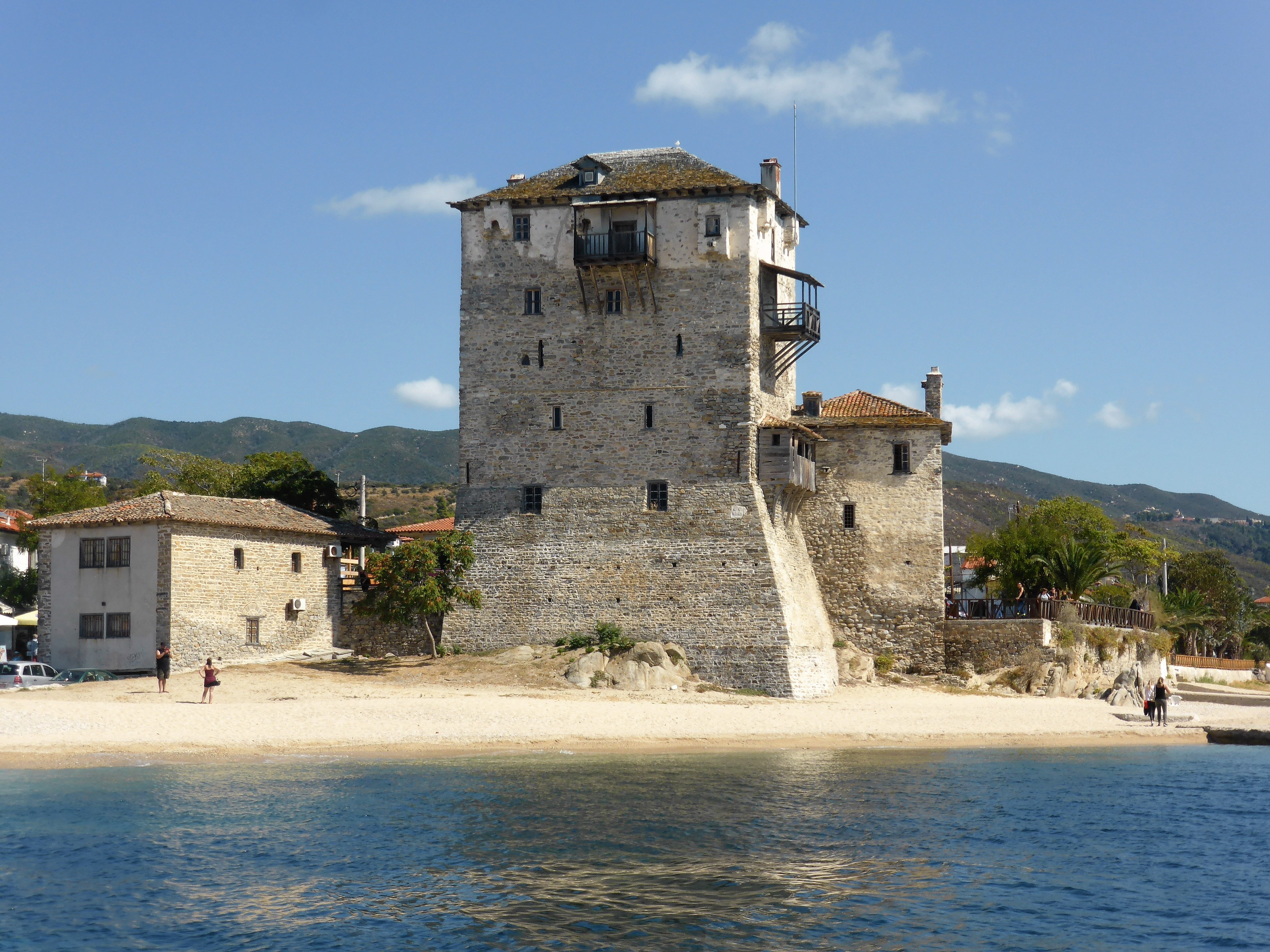 Prosphorios-Turm beim Bootsanlegesteg in Ouranoupoli, Chalkidiki. Hier starten die Ausflugsboote entlang der Halbinsel Athos, Griechenland.